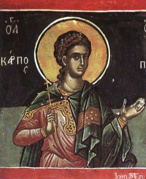 Святой Апостол Карп из семидесяти